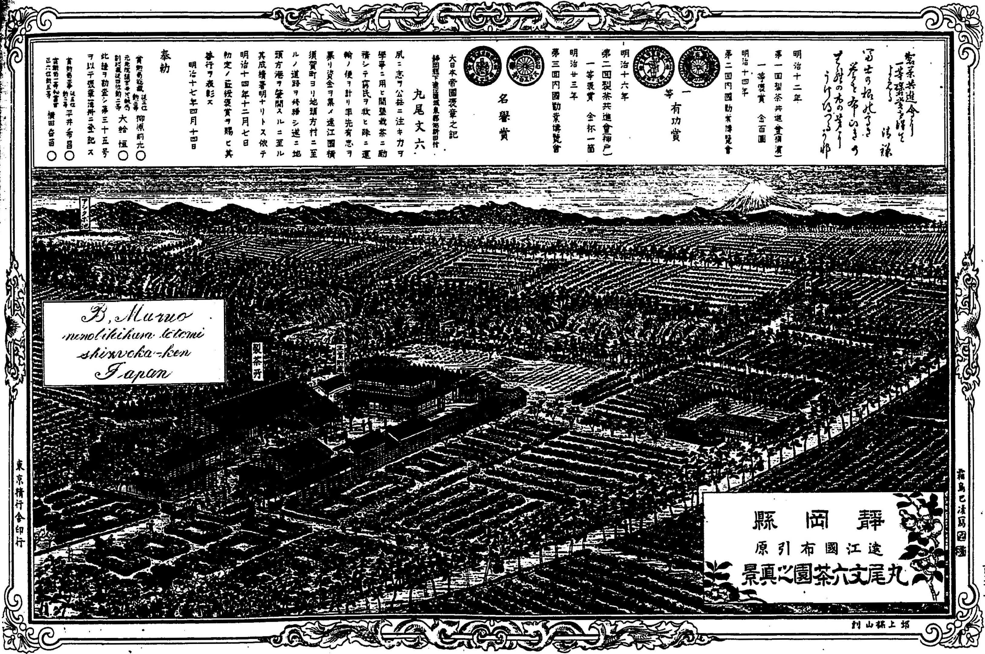 靑山豊太郎編『日本博覧圖――靜岡縣』初篇、精行舎、1892年。